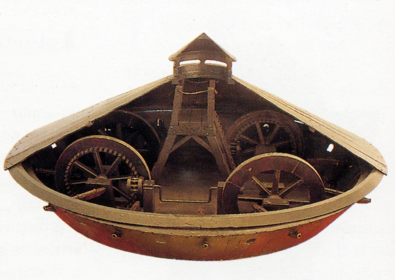 Il modello rappresenta un carro armato a forma di testuggine, rinforzato con piastre metalliche e aperto da un lato per poter vedere l'interno. È sormontato da una torretta interna di avvistamento e armato di cannoni. Il movimento del carro è garantito da otto uomini che azionavano dall'interno un sistema di ingranaggi collegato alle quattro ruote Funzione Il carro è pensato per portare panico e distruzione tra i nemici Modalità d'uso La direzione del fuoco poteva essere decisa dagli uomini posti nella parte alta del carro, da dove, attraverso delle strette fessure, potevano vedere il campo di battaglia.